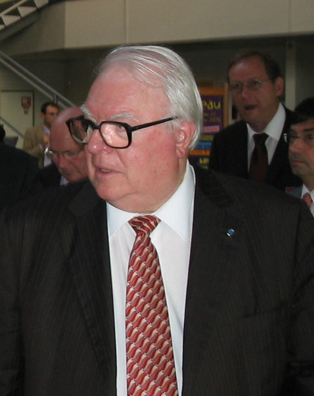 Pierre Mauroy, président de la communauté urbaine de Lille, ancien premier ministre. Je suis l'auteur du cliché pris en novembre 2005 aux Assises des Communautés Urbaines de France au Creusot (Saône-et-Loire)